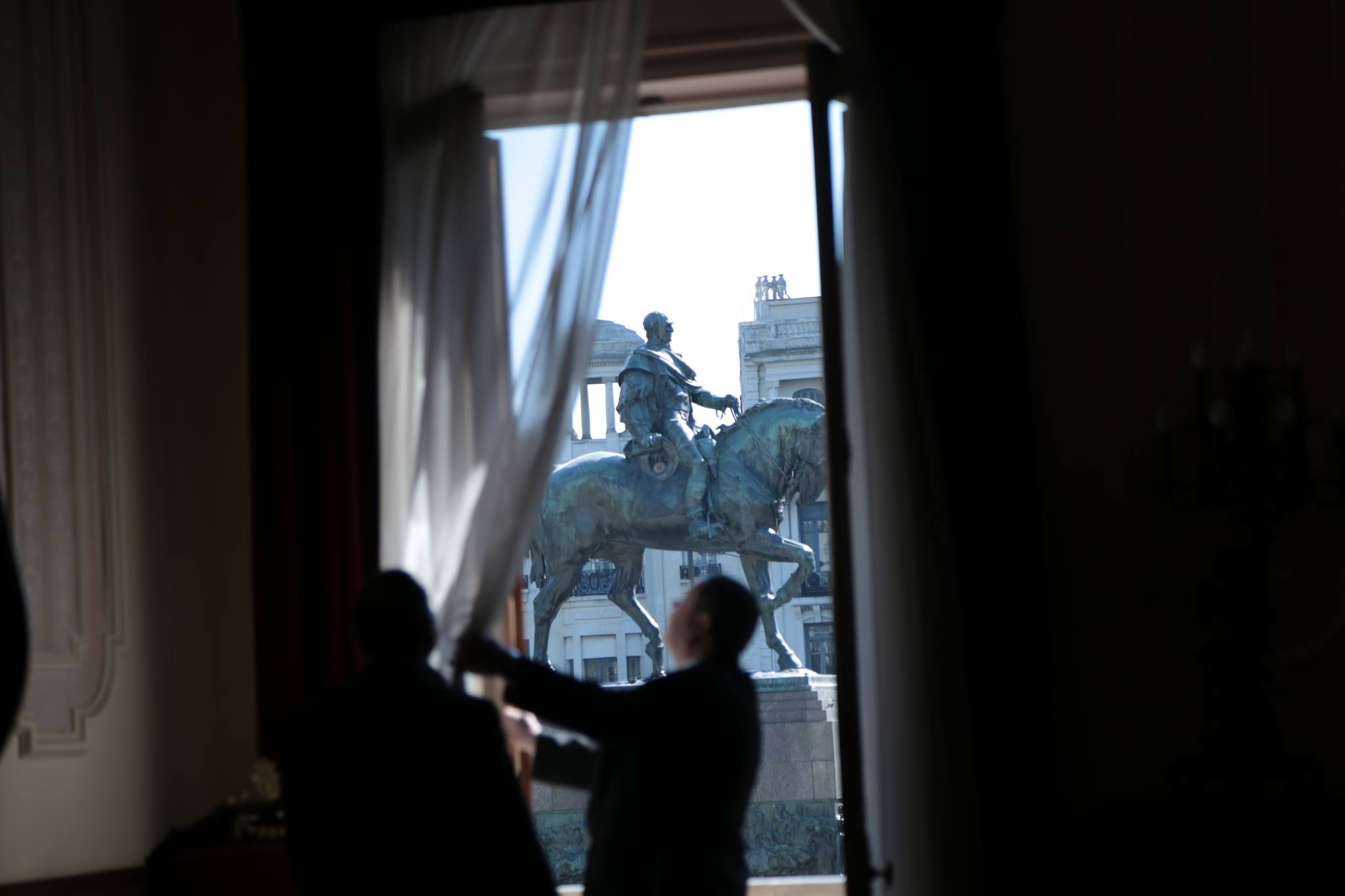 General José Artigas (estatua ecuestre de Plaza Independencia). Ubicada en el departamento de Montevideo